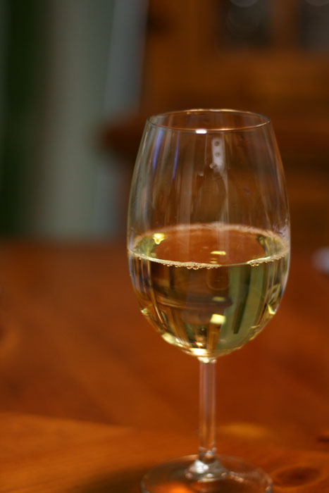 Gewürztraminer wine in glass